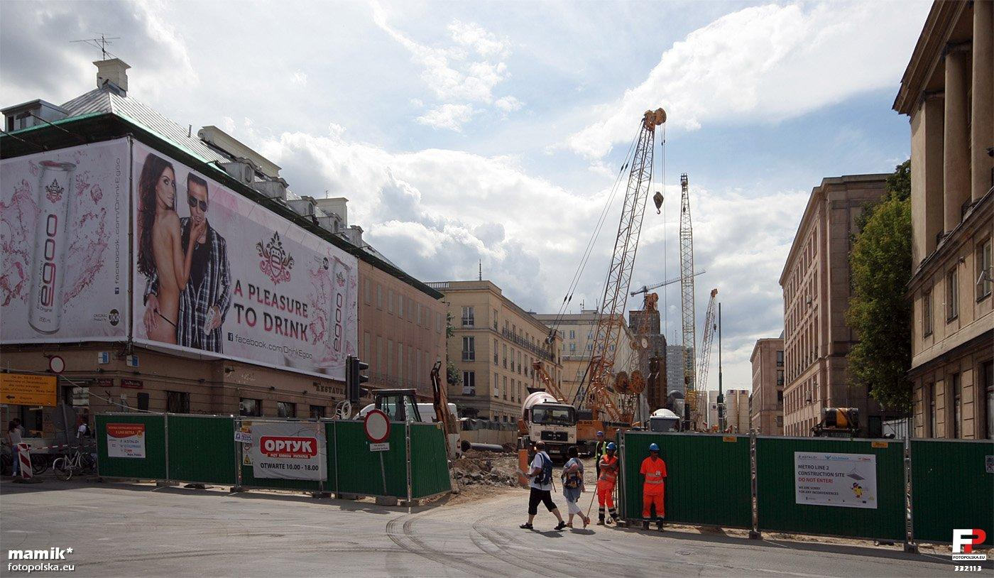 Budowa drugiej linii metra, Świętokrzyska róg Nowego Światu